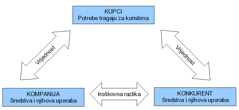 Grafički prikaz međuodnosa kupaca, konkurenata i kompanija